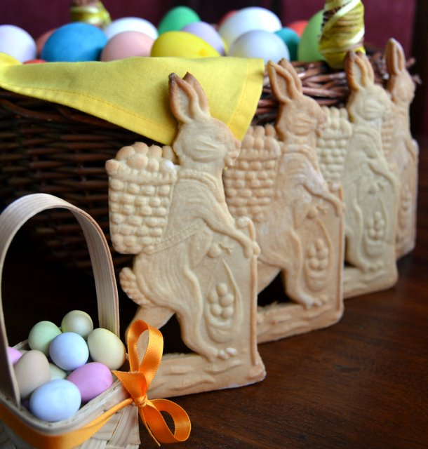 Easter Bunnies